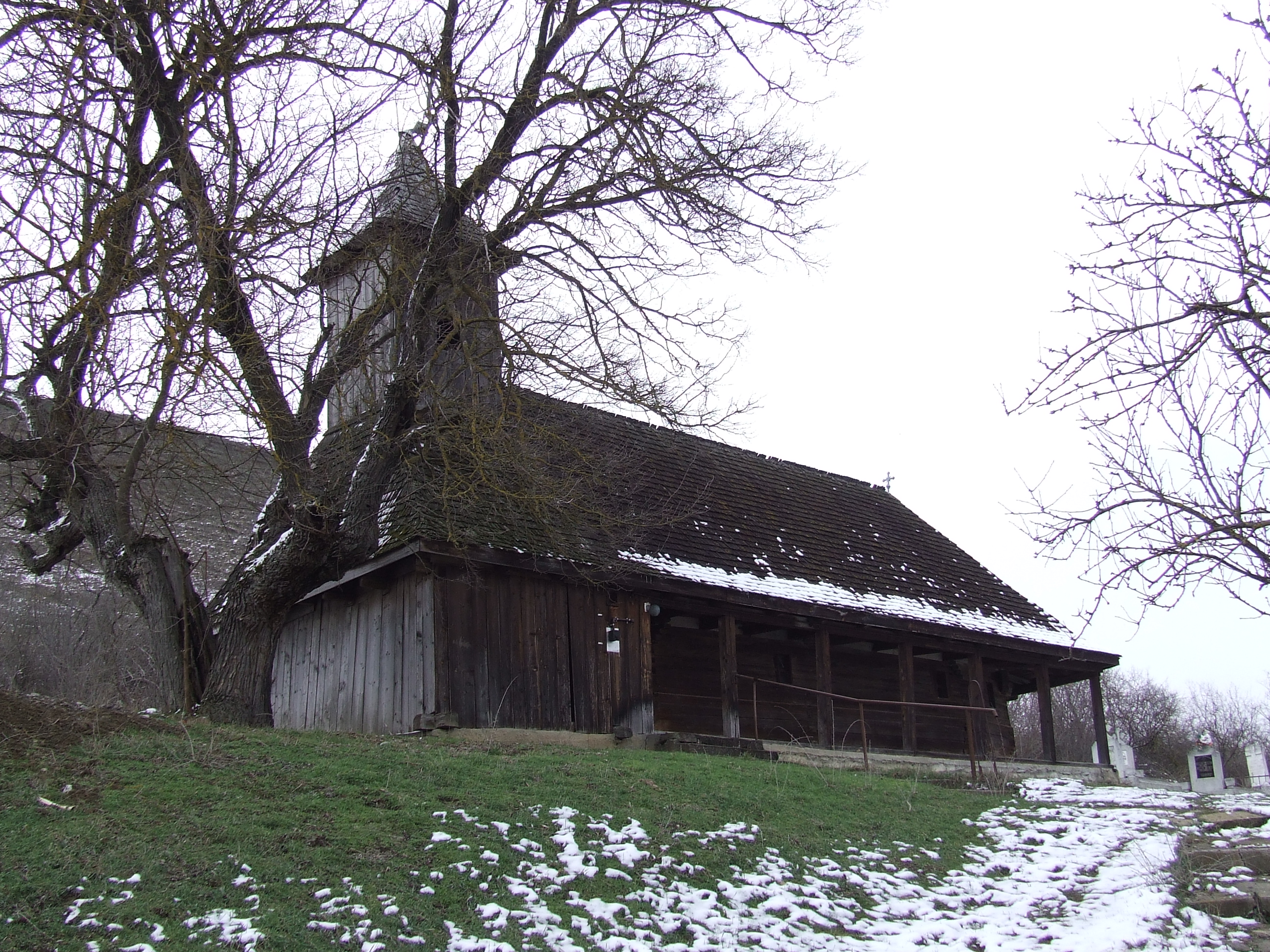 Biserica de lemn din Sânmărghita, judeţul Mureş.